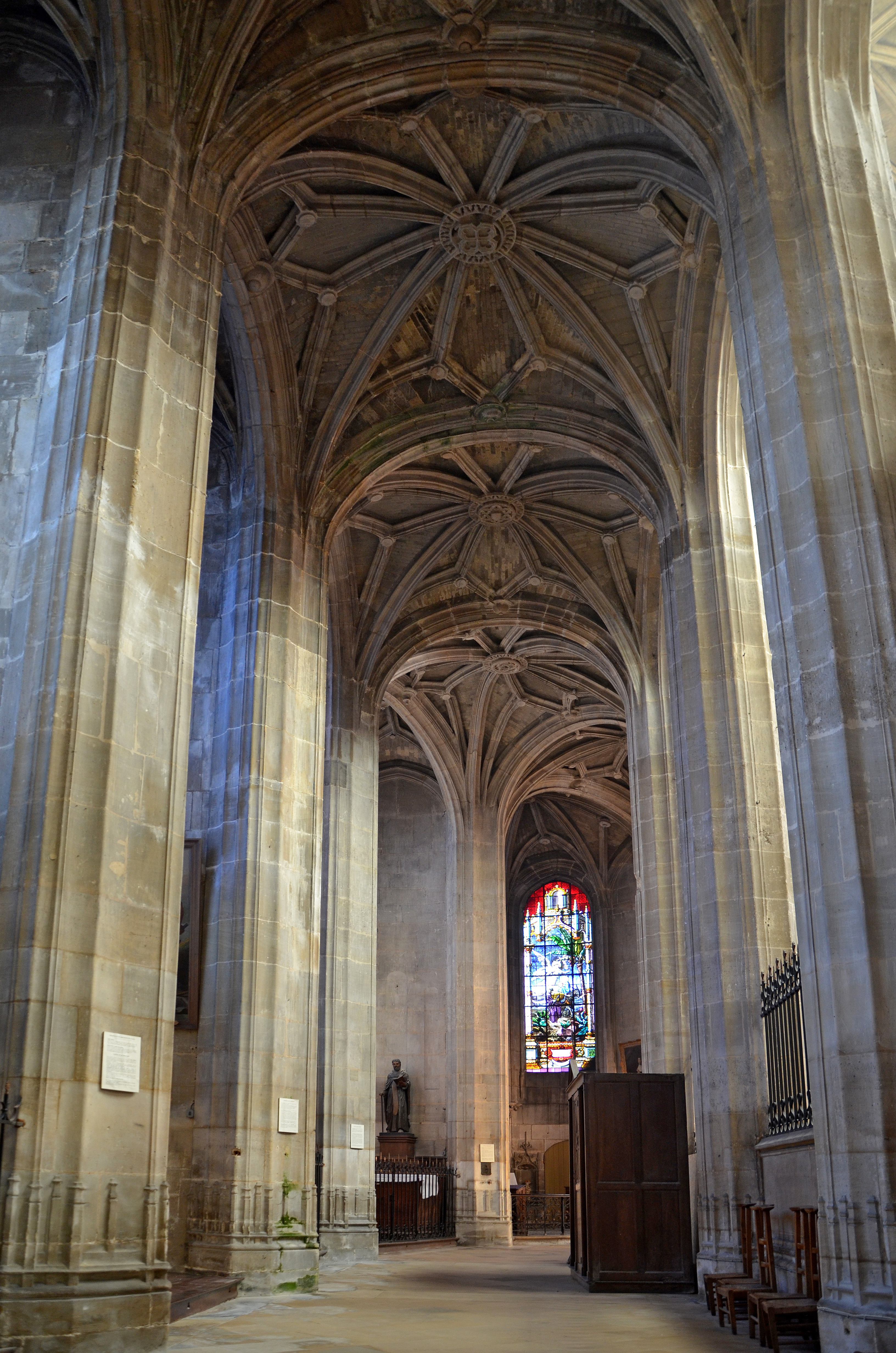 Déambulatoire, côté nord. Église Saint-Antoine à Compiègne, Oise, Picardie, France.